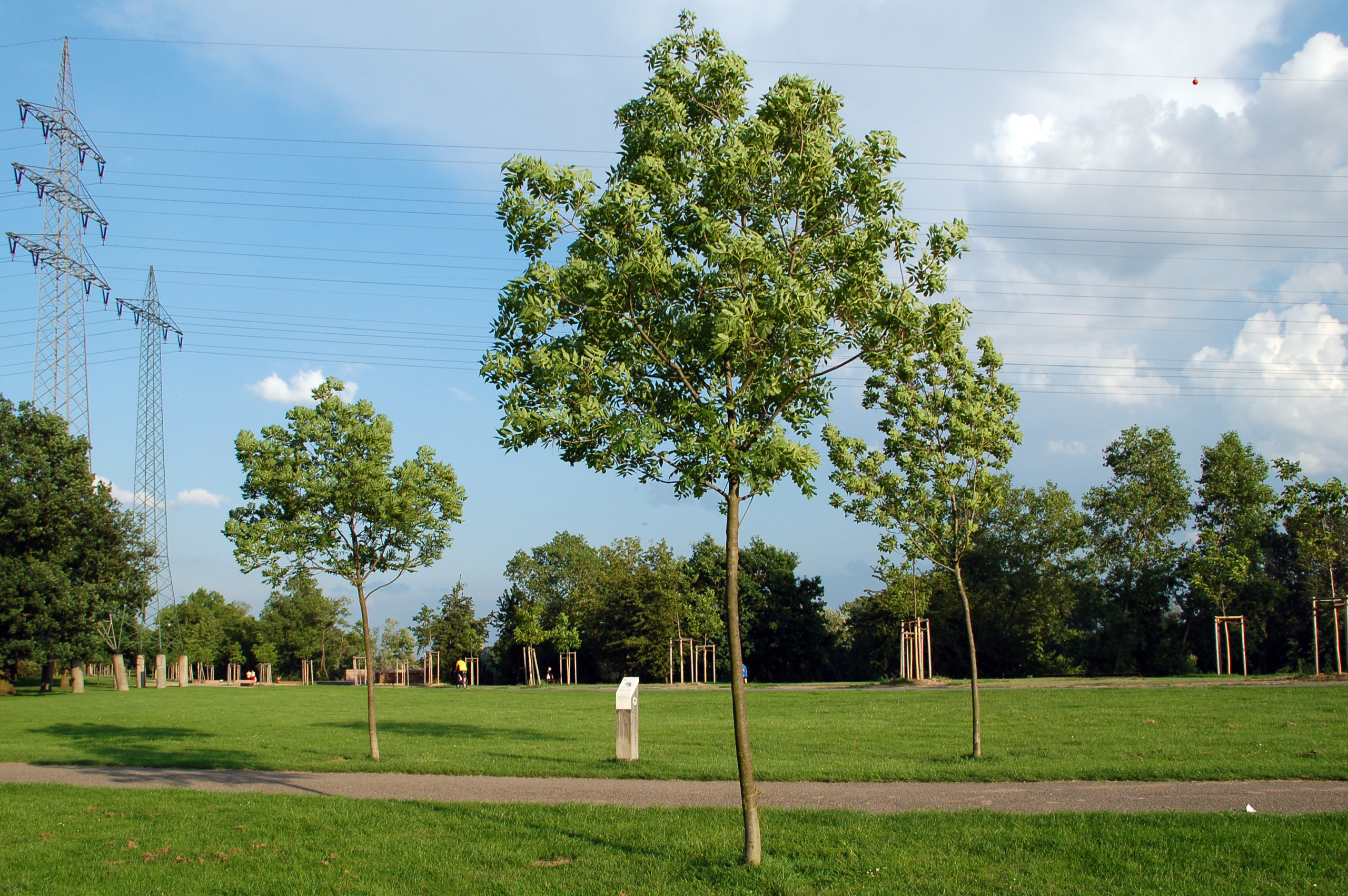 Gernhardt-Eschen, benannt nach dem Frankfurter Dichter und Zeichner Robert Gernhardt (1937–2006), und Grüngürteltier-Stele an der Wörthspitze